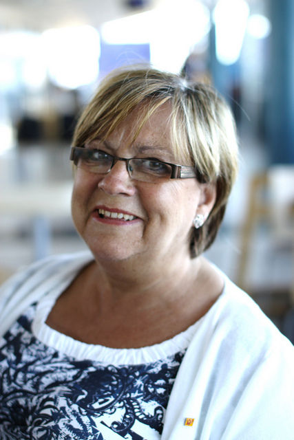 Stortingsrepresentant for KrF